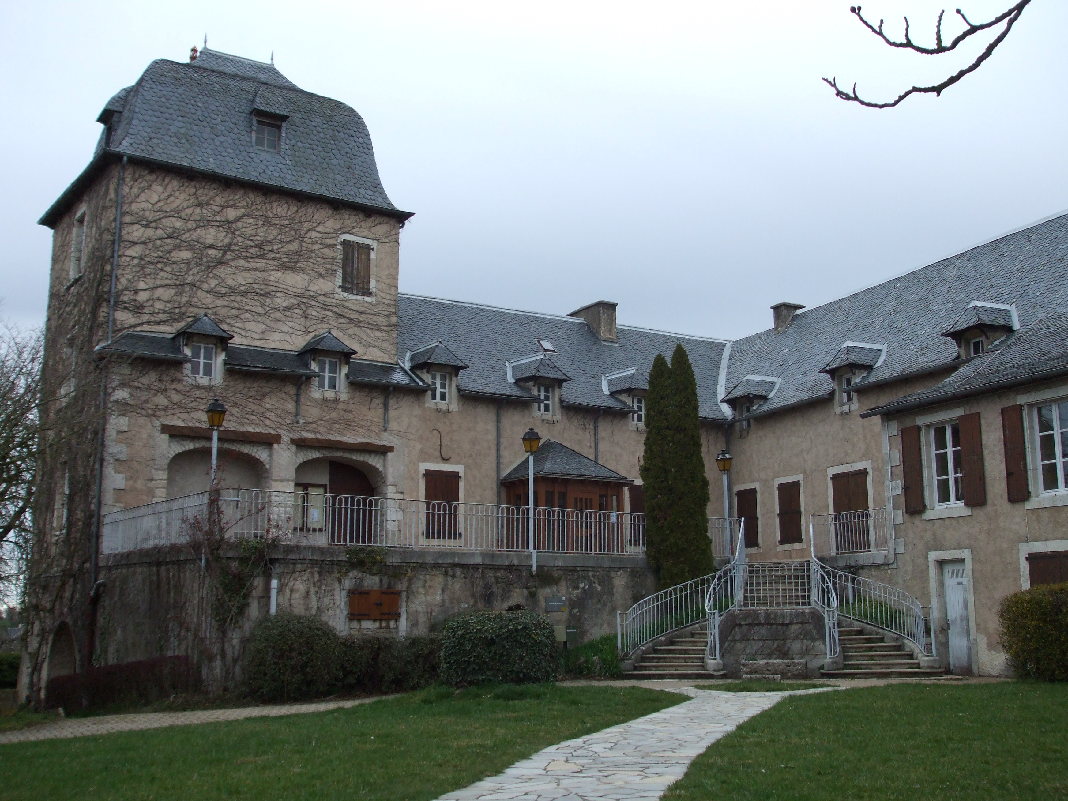 Mairie de Sébazac-Concourès.